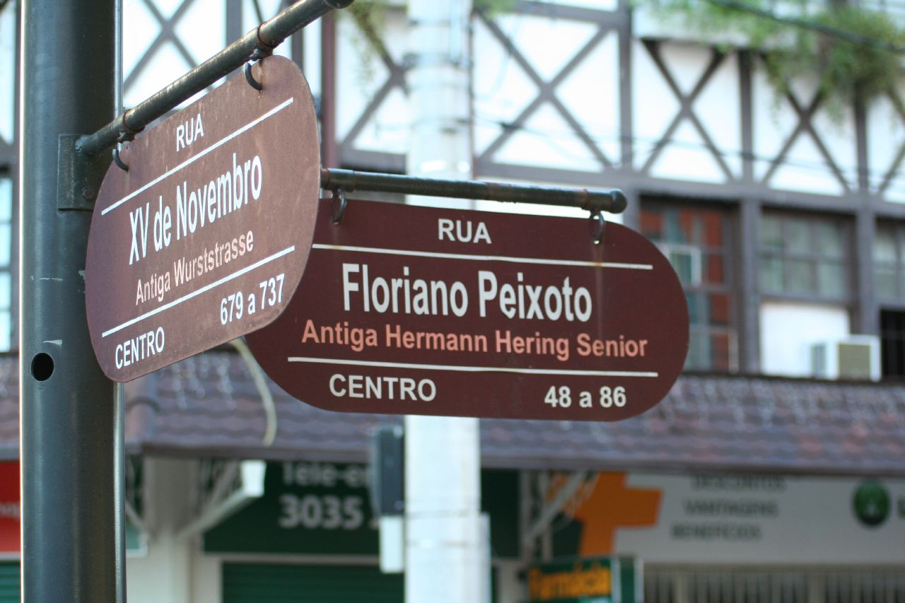 Placas do centro de Blumenau, mostrando os atuais e antigos nomes das ruas.